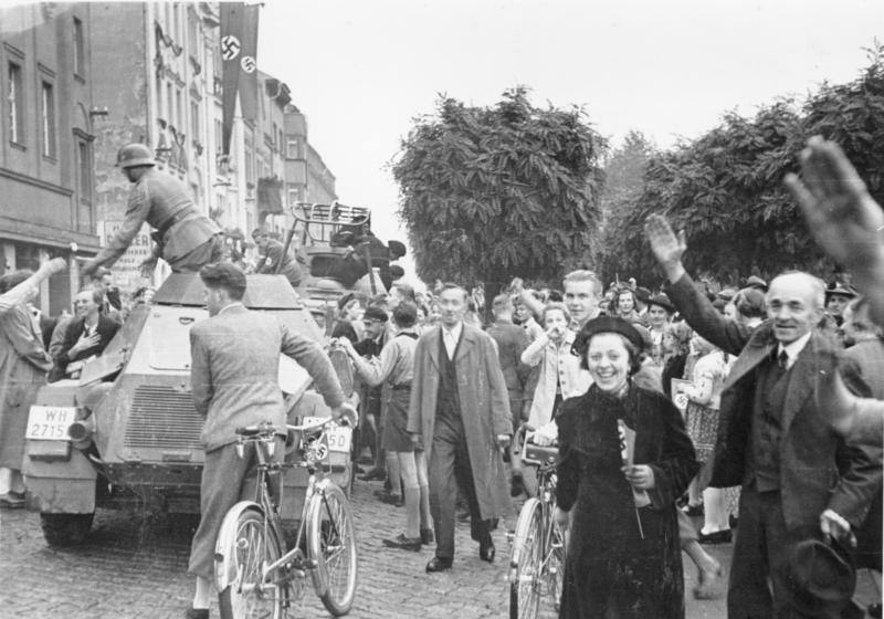 Einmarsch in das Sudetenland. Pz.-Spähwagen treffen in Aussig ein. German armored cars enter the city of Aussig in the Sudeten. 9.10.1938 Aussig. Sudetenland.